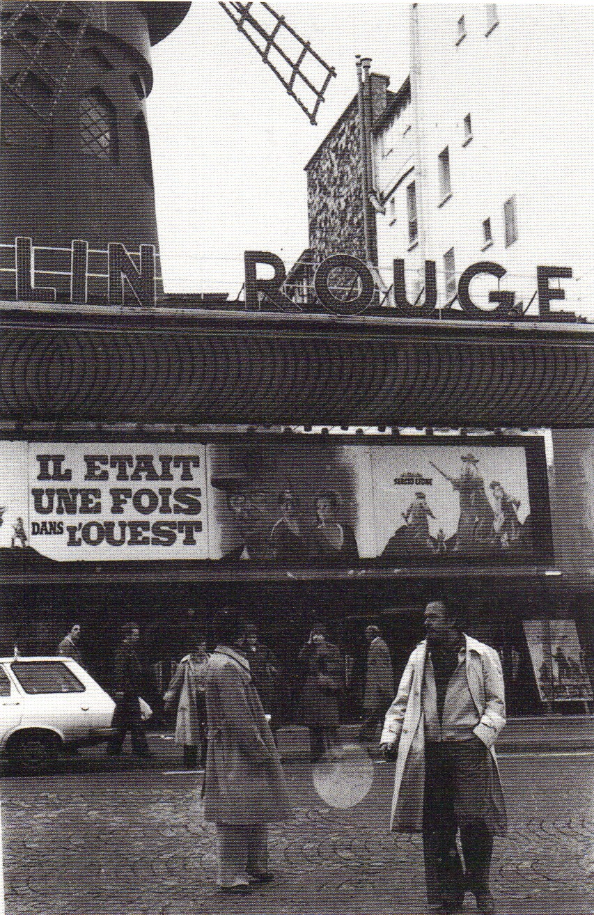 Ruizanglada frente al Moulin Rouge de Paris